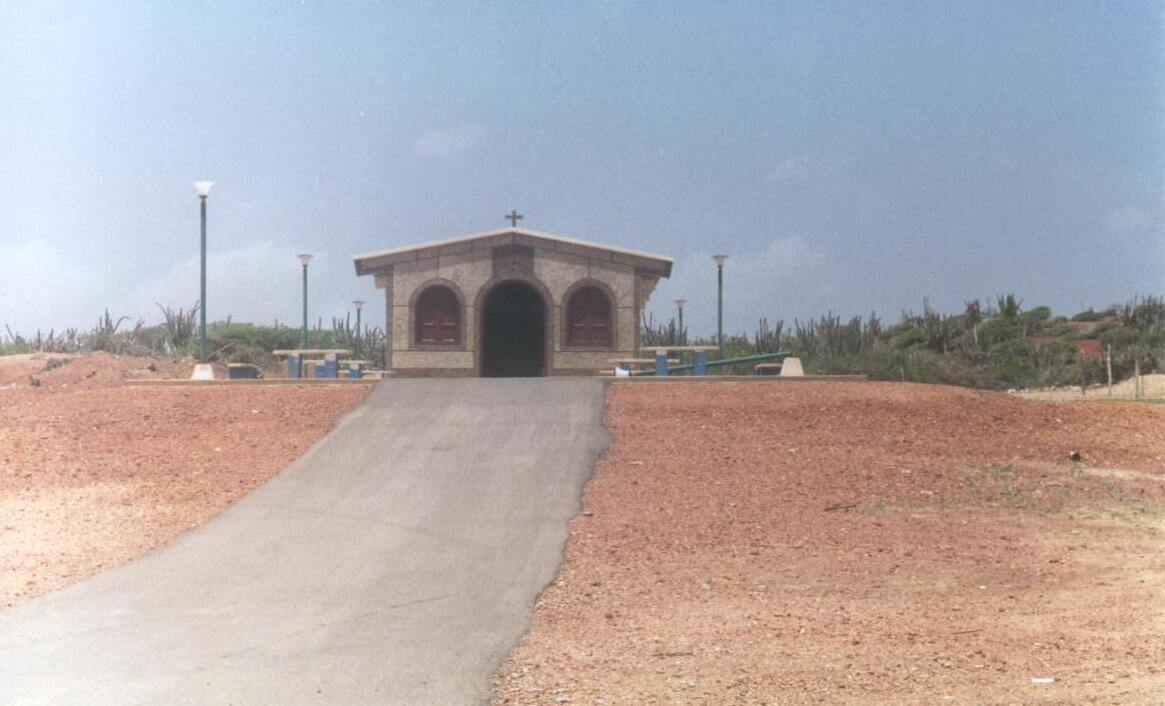 Ermita en la costa norte de la Isla de Coche (Venezuela). Autor: Fev. Fecha: junio 1996.